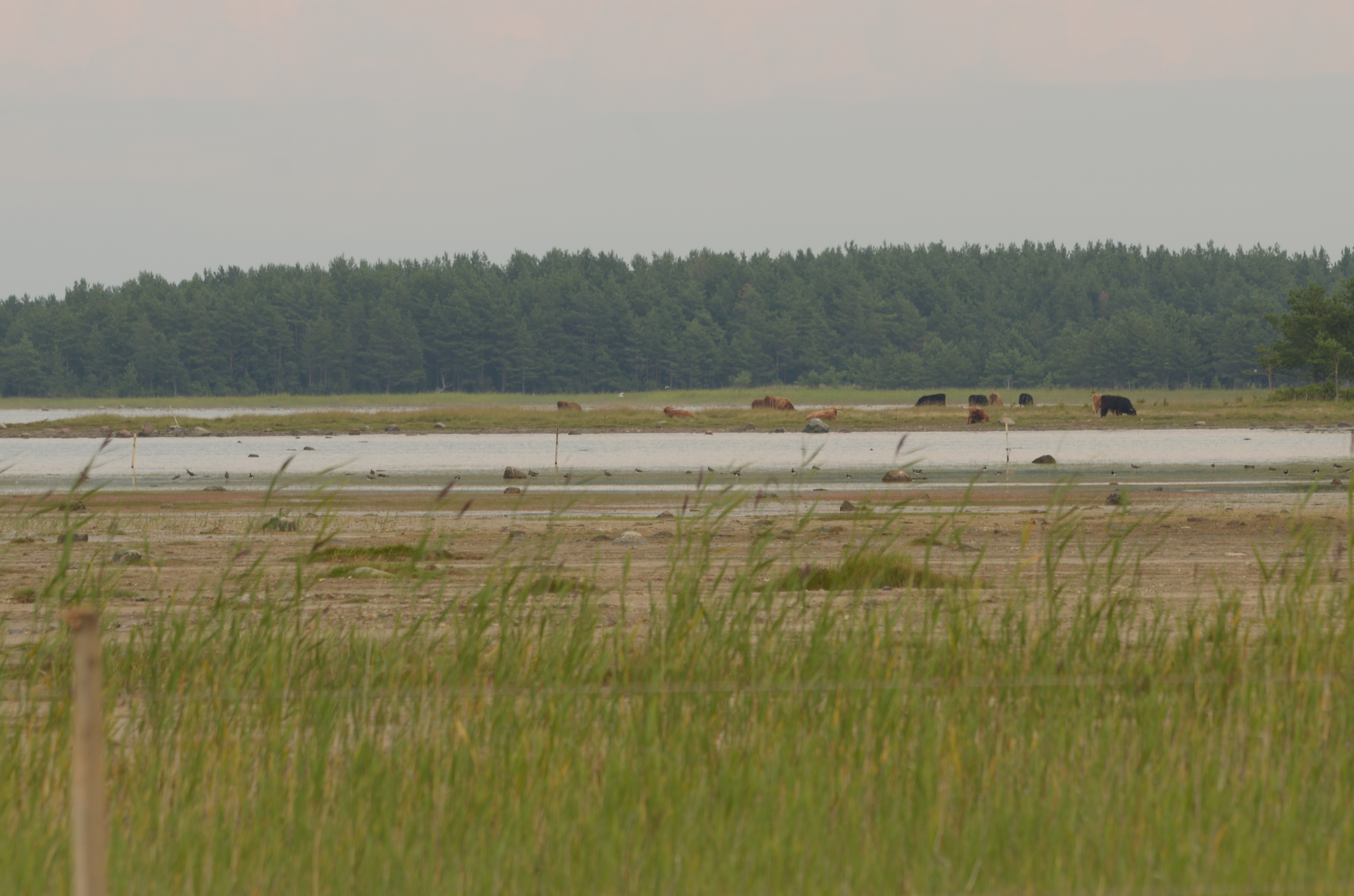 Vaade Eeriksaare poolsaarelt Kuusnõmme lahe suunas